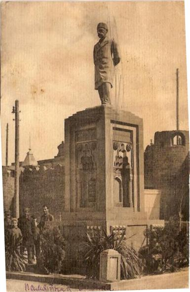 Баку в 1920-е годы. Памятник поэту Сабиру